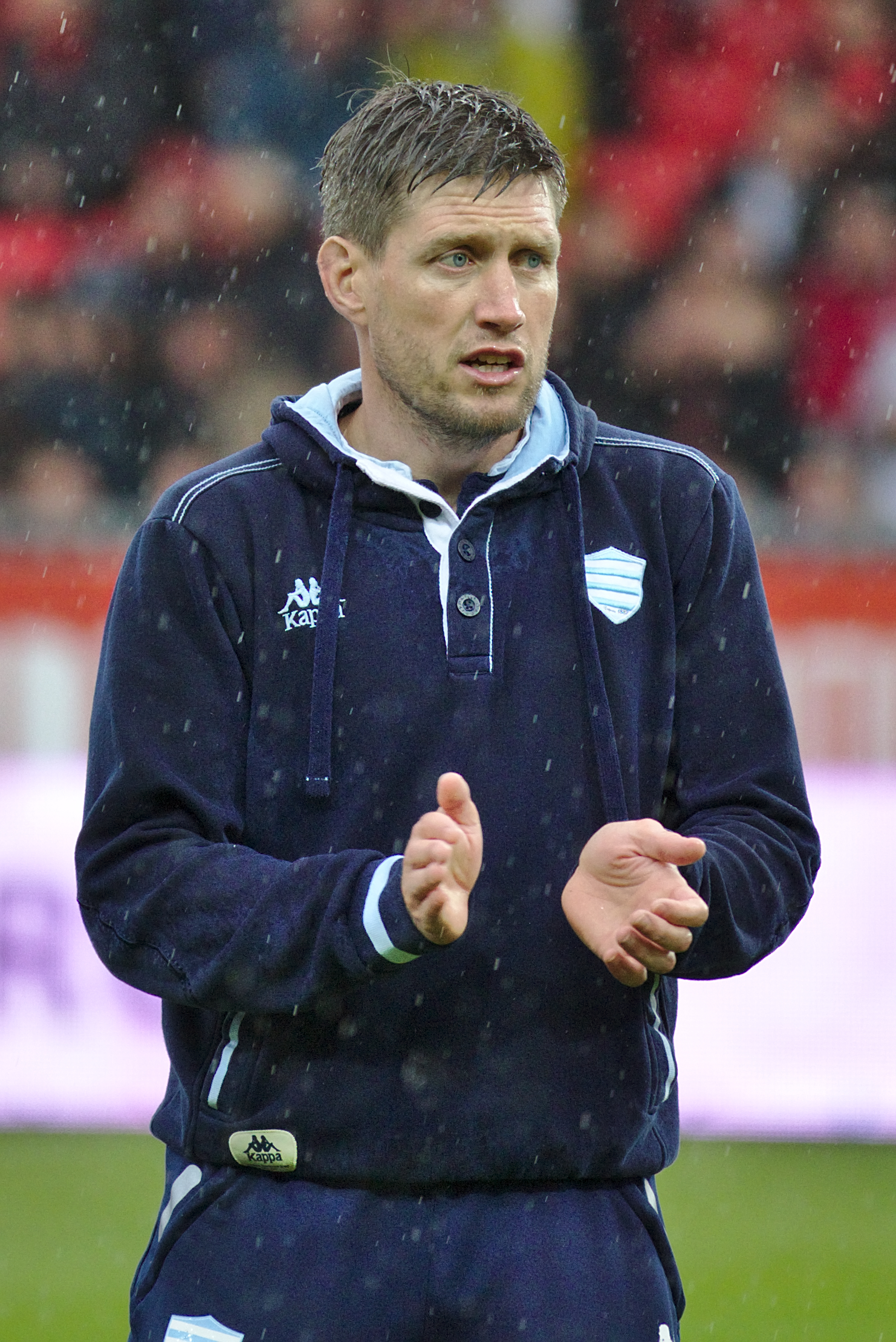 USO - RM92 - 20150425 - Ronan O'Gara